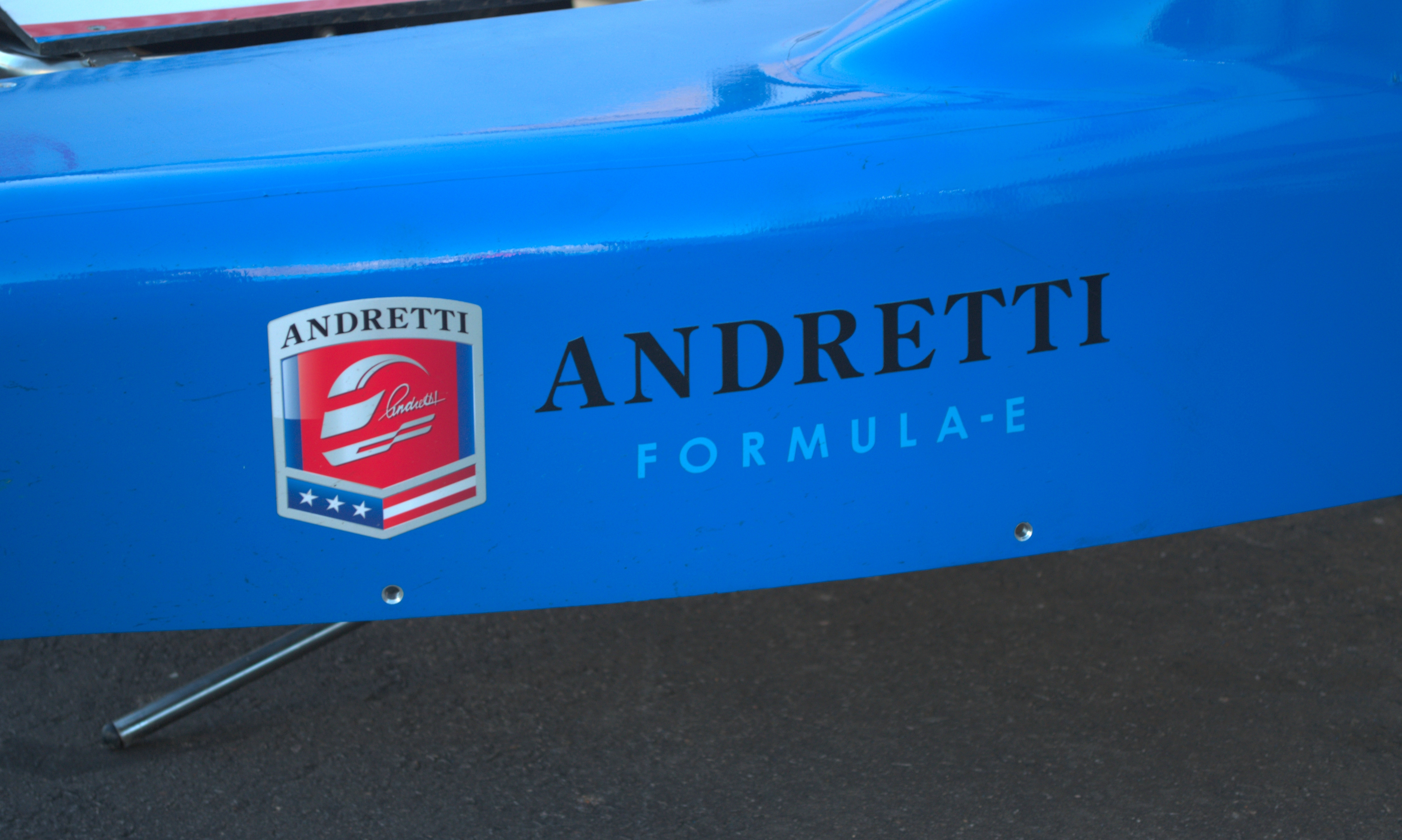 Solo se permite el uso de esta imagen mencionando a Velocidad Total como su autor. Imagen del equipo Andretti de Fórmula E, durante el Punta del Este ePrix de 2014.